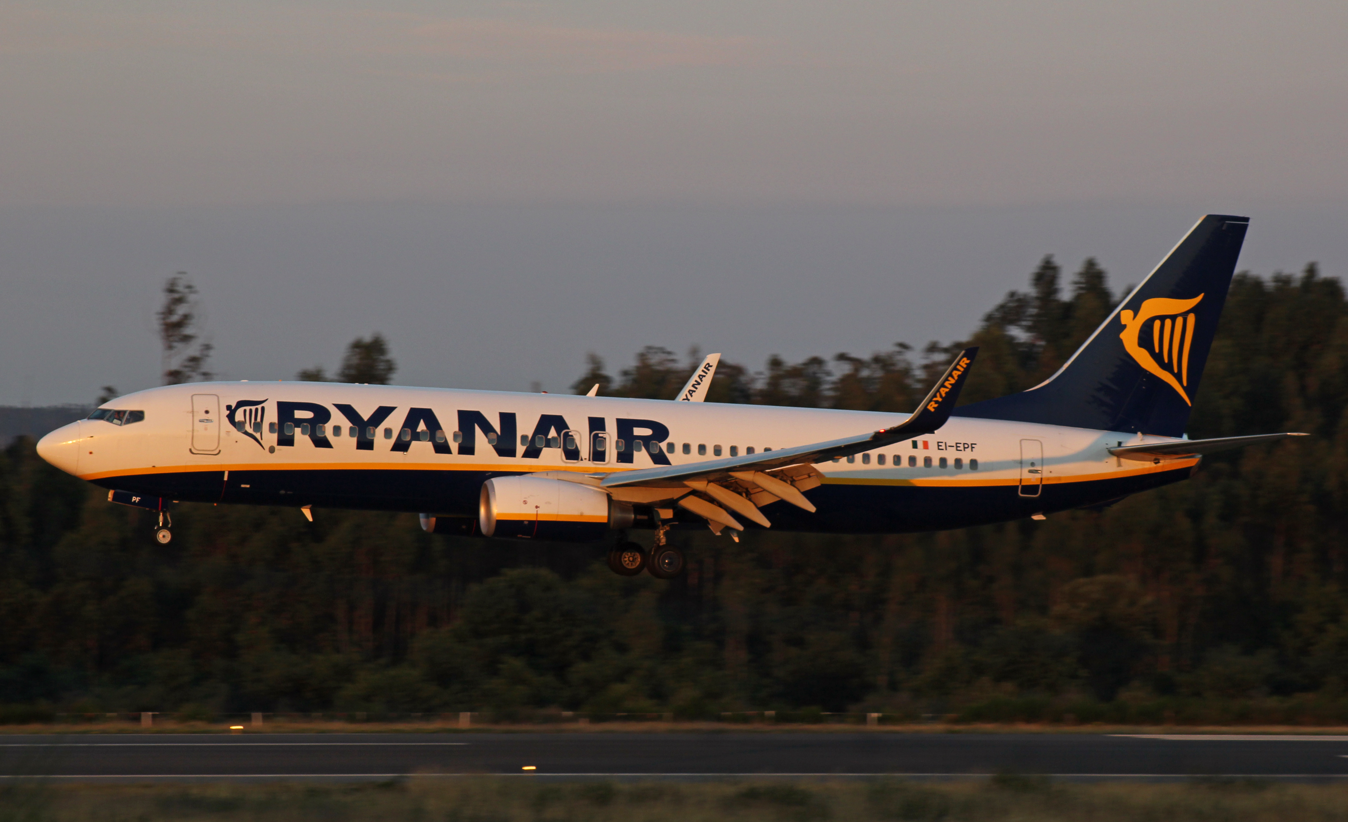 Boeing 737 de Ryanair aterrando no aeroporto de Santiago de Compostela.